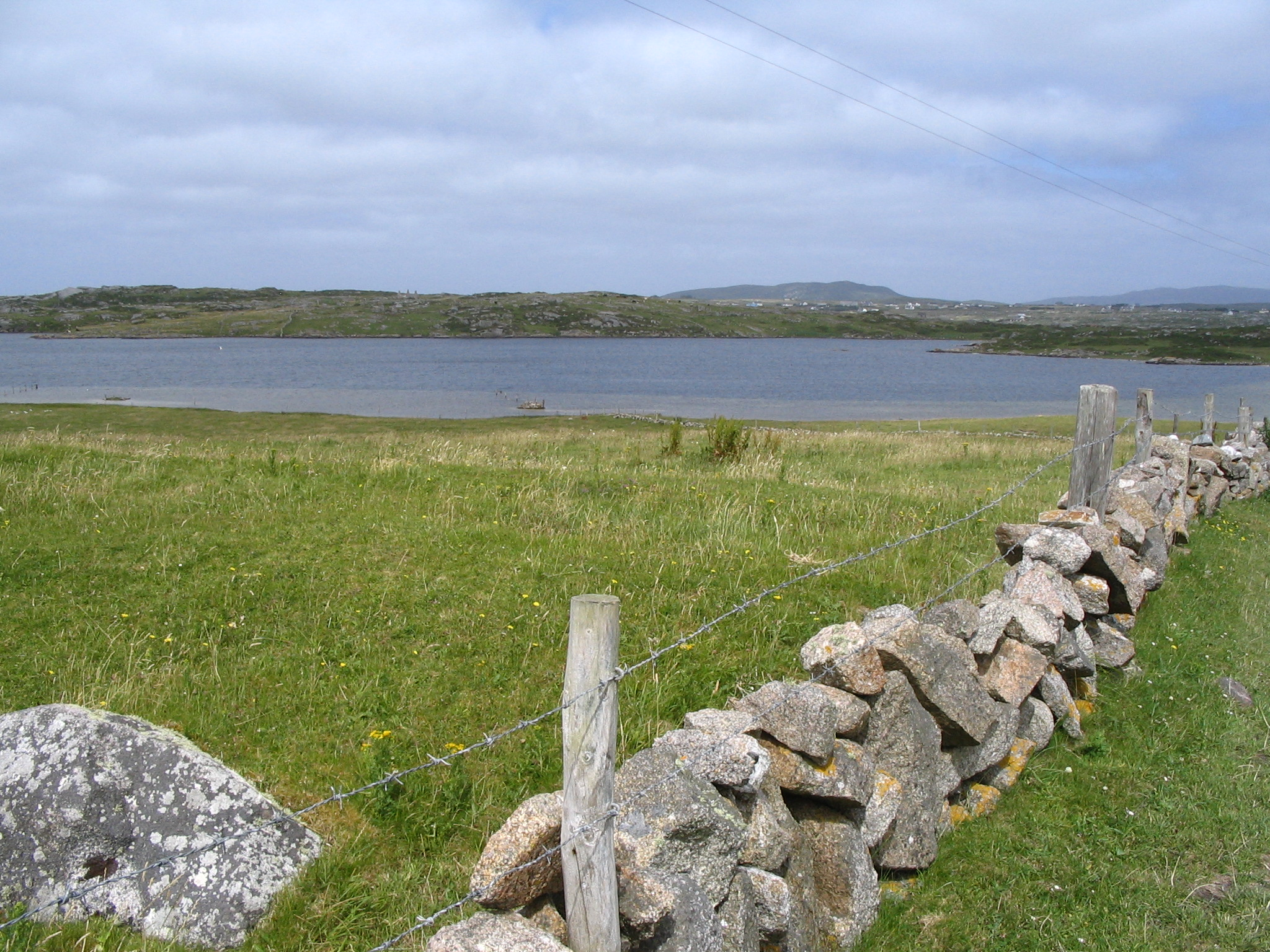 Omey Island: Fahy Lough